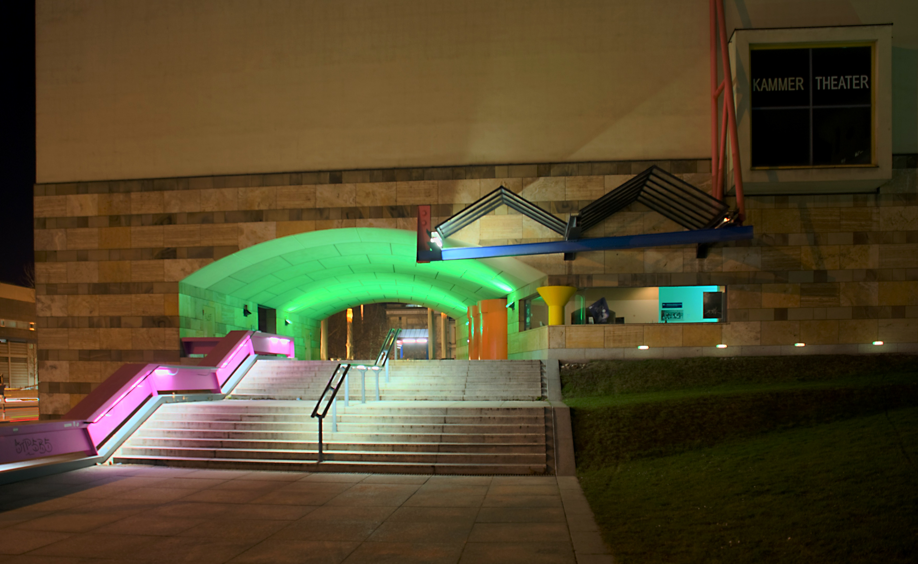 Kammertheater Stuttgart, Eingangsbereich (HDR-Bild aus drei Aufnahmen, mit WebHDR erstellt)